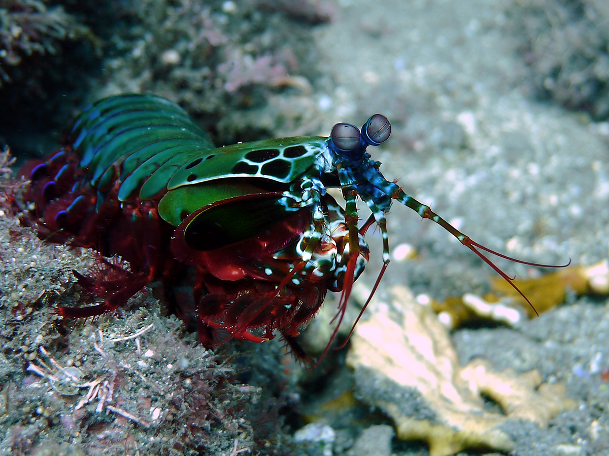 Une squille multicolore ou crevette-mante paon (Odontodactylus scyllarus) à la Réunion.